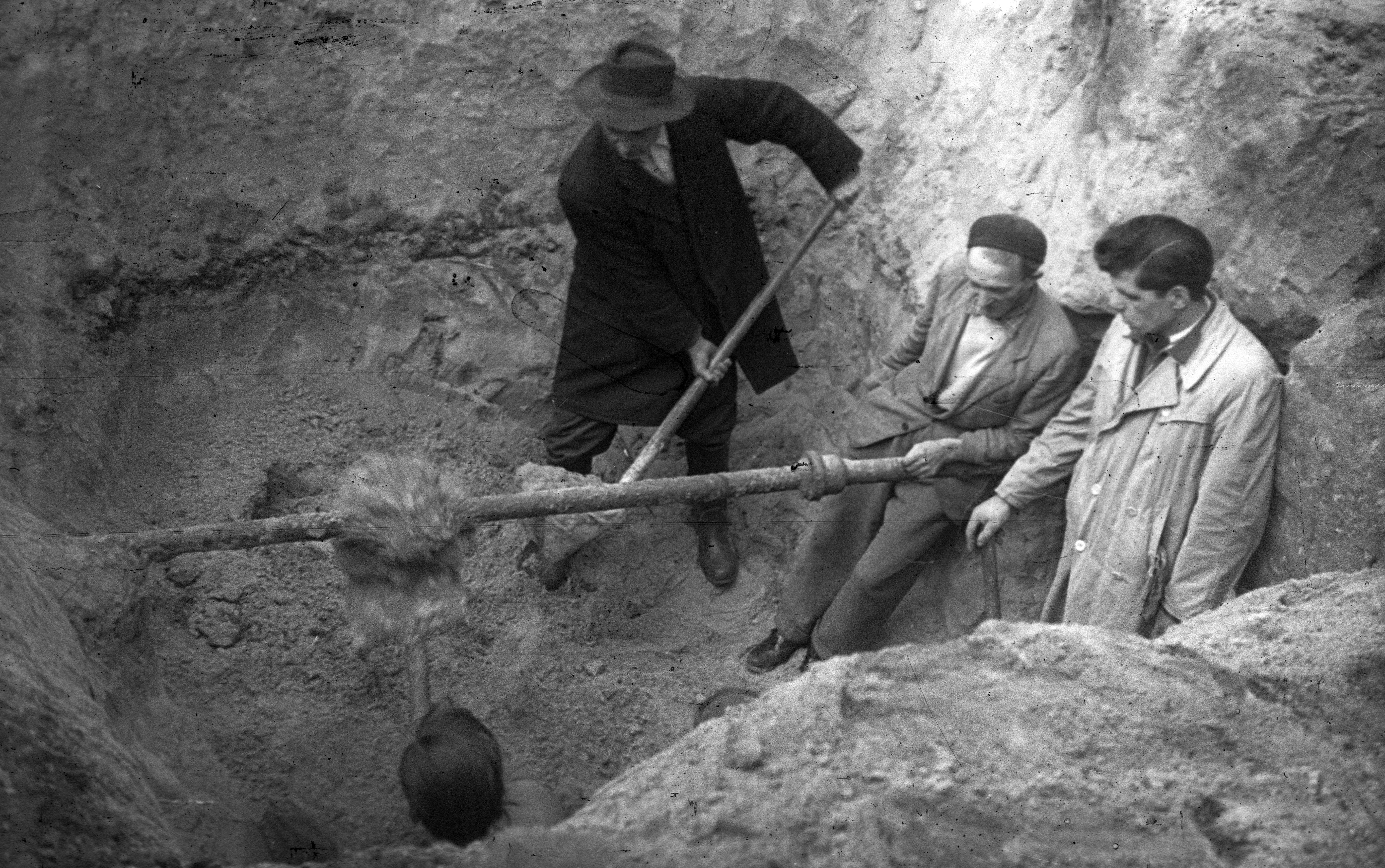 II. János Pál (Köztársaság) tér, a pártházhoz kötődő feltételezett kazamaták keresése. Location: Hungary, Budapest VIII. Tags: revolution, work, men, tool, Budapest Title: II. János Pál (Köztársaság) tér, a pártházhoz kötődő feltételezett kazamaták keresése.